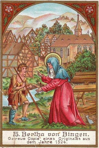 St. Bertha von Bingen, Litho von 1860, nach mittelalterlichem Bild